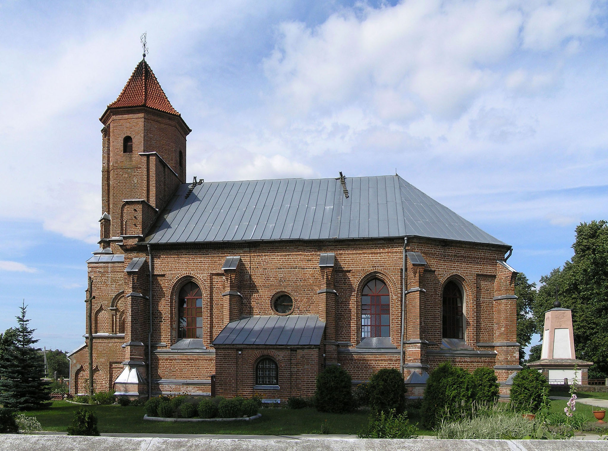 Беларуская (тарашкевіца): Гнезна